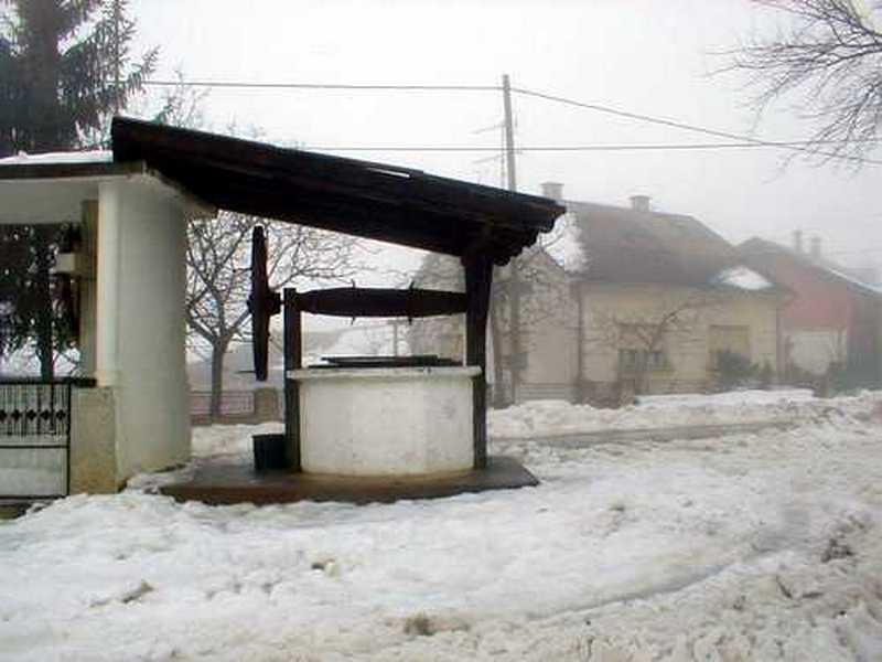 Lukovo - Bunar u centru sela